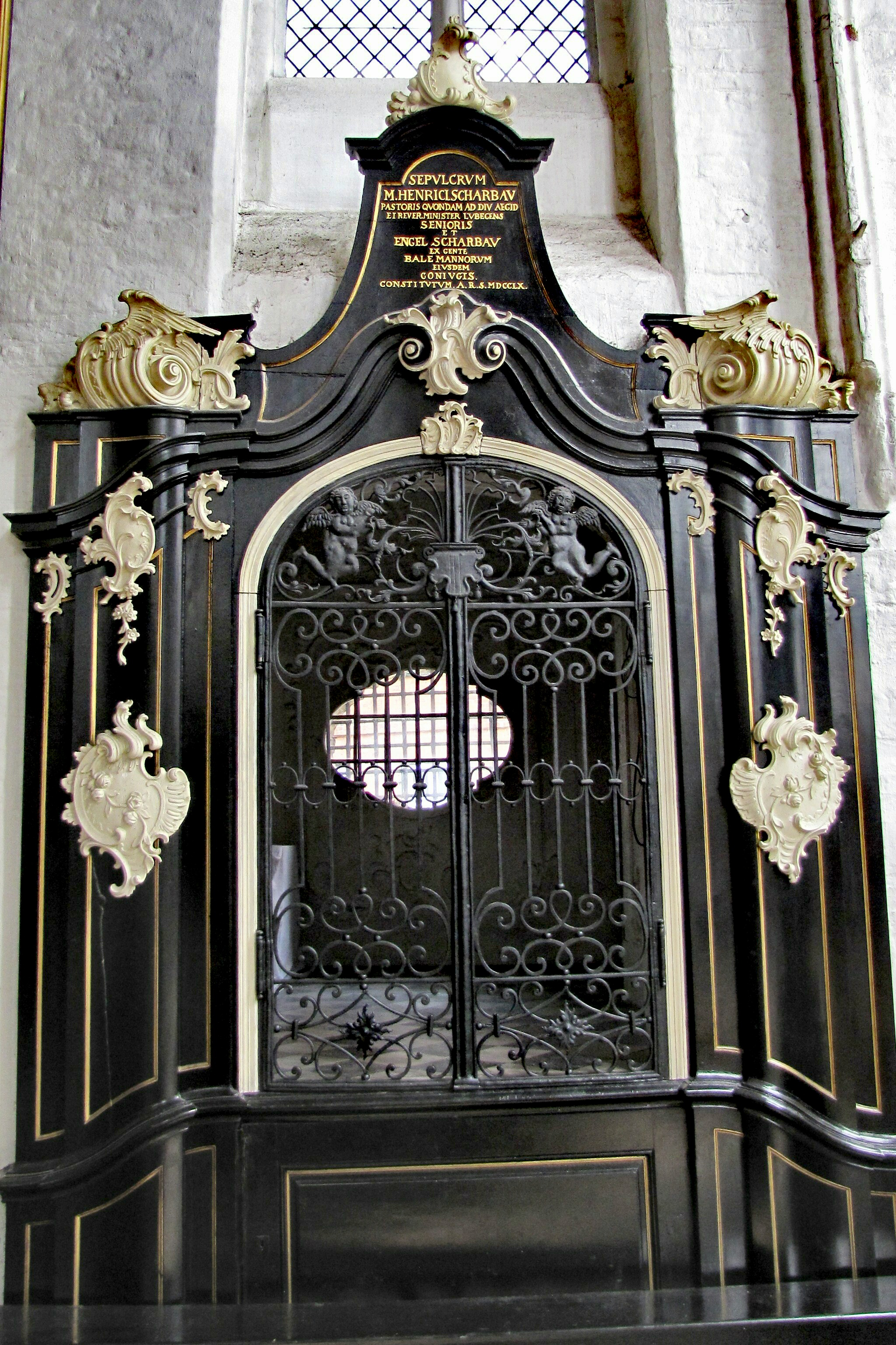 Burial chapel for Heinrich Scharbau